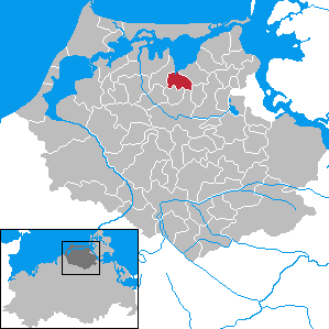 Groß Kordshagen in Mecklenburg-Vorpommern - District Nordvorpommern